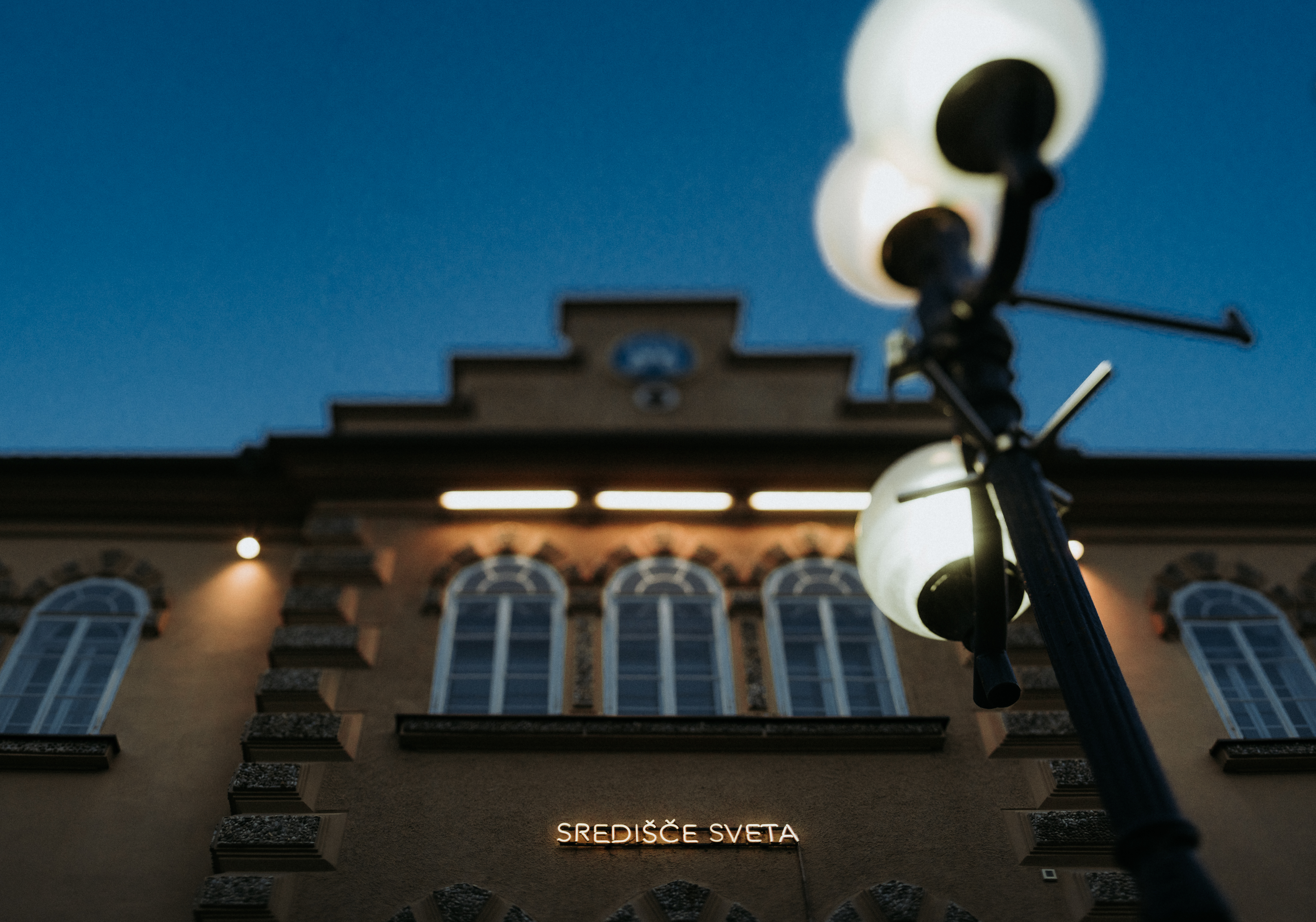 Središče sveta, Fokus Grupa, Dobran Laznik